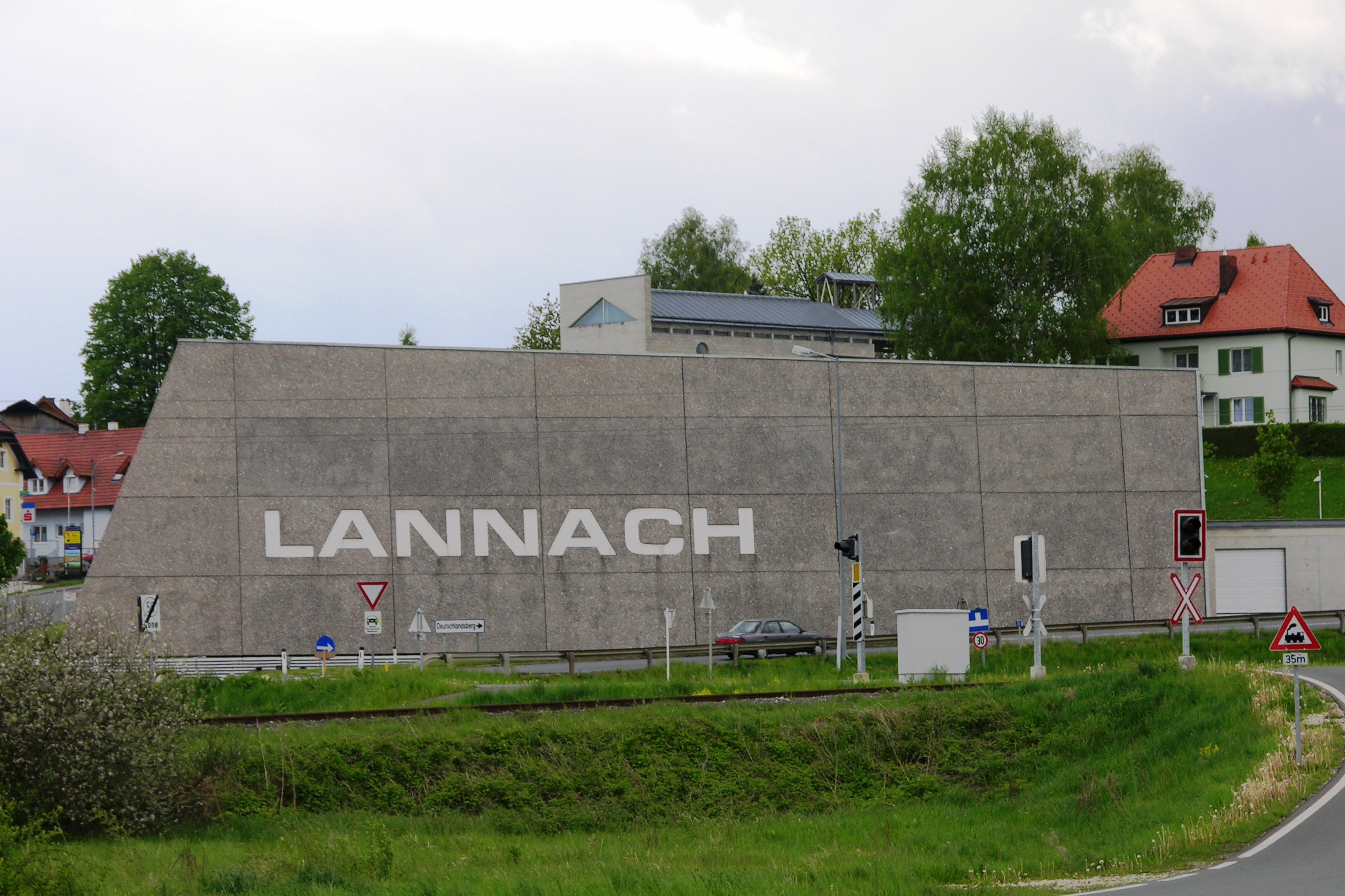 Lannach Ansicht (2008)